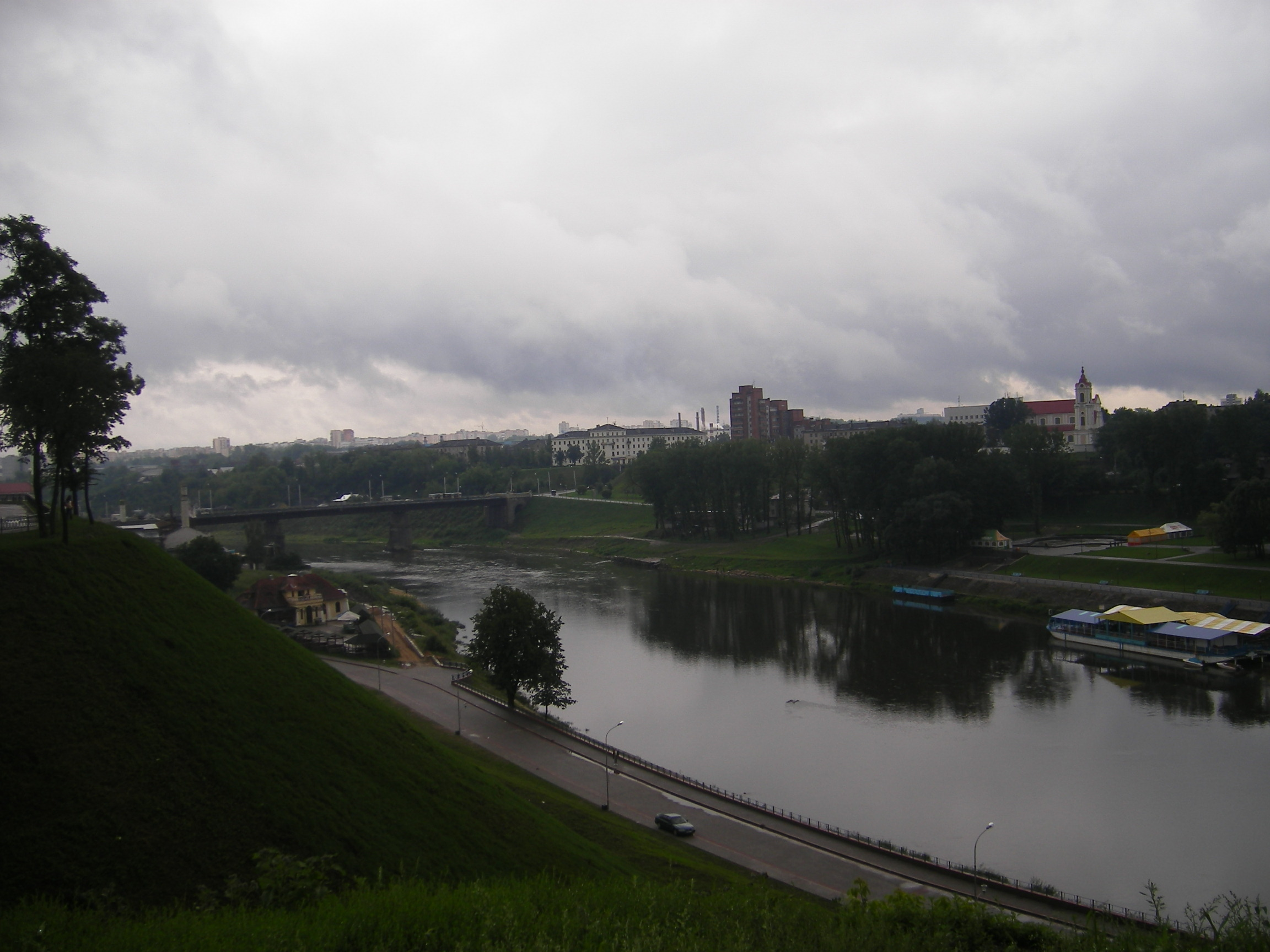 Neman river in Hrodna, Belarus